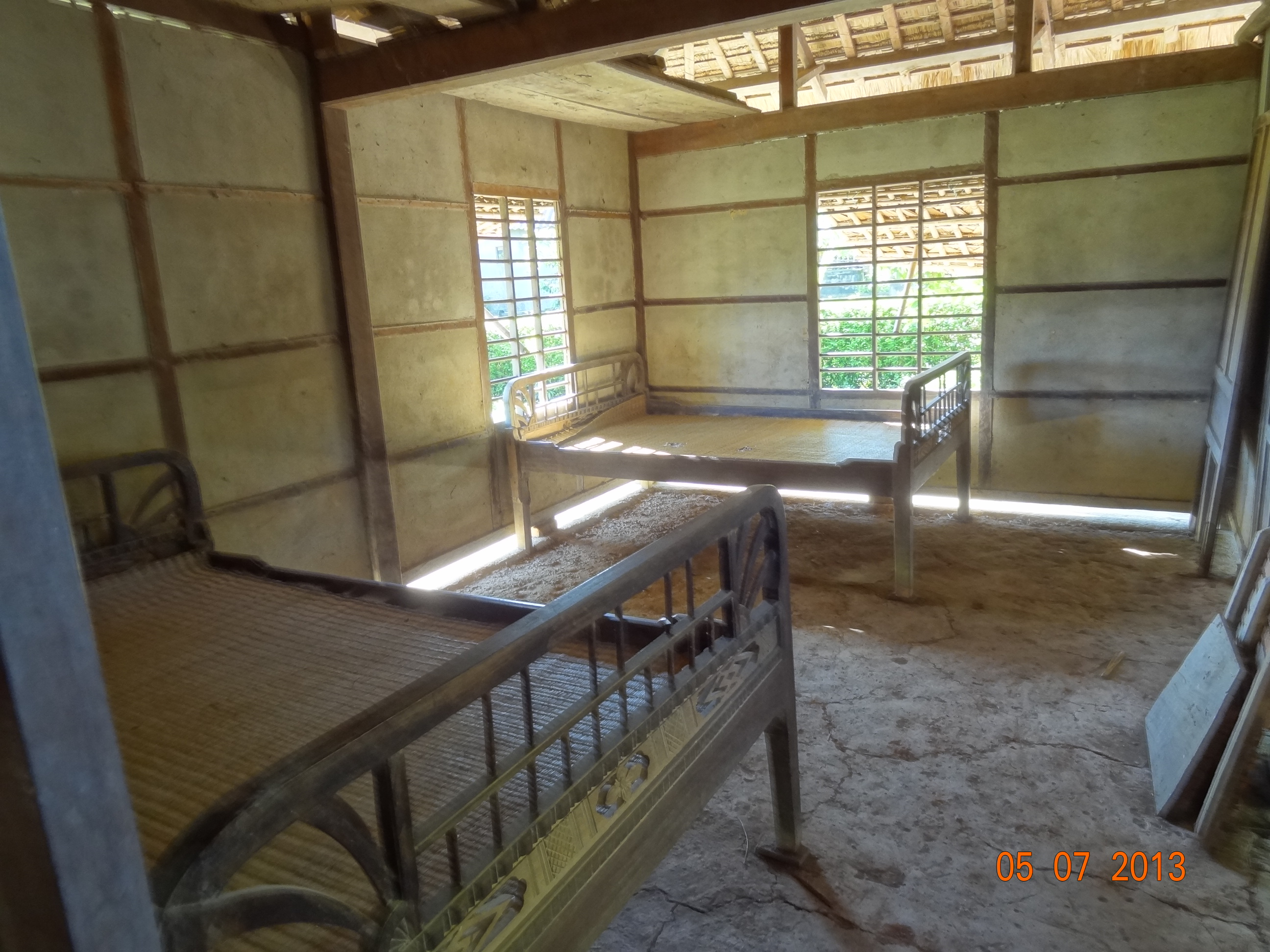 Chambre